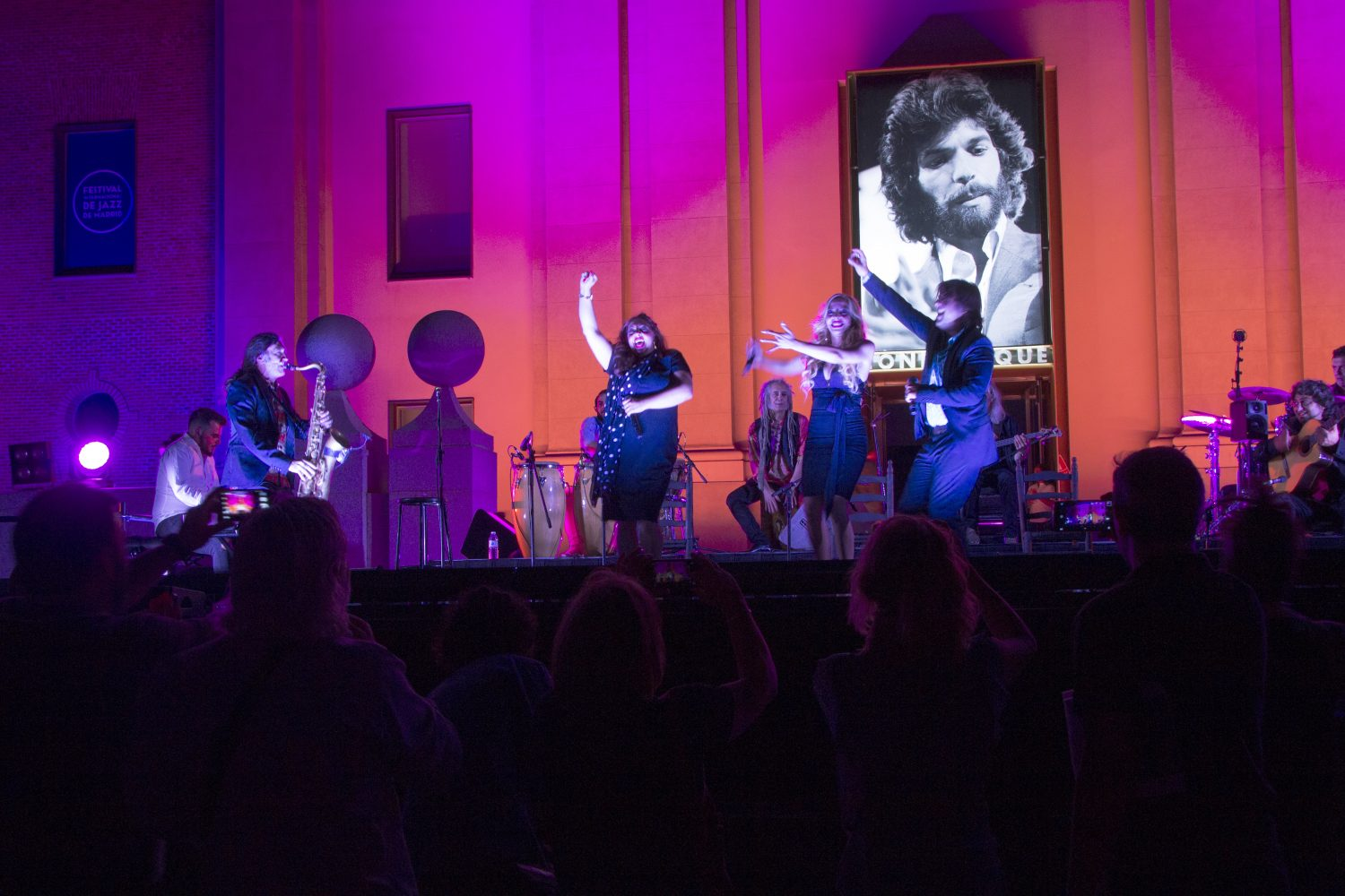 Lleno absoluto en el homenaje al mítico cantaor gitano José Monje Cruz, más conocido como Camarón de la Isla (1950 – 1992), celebrado ayer domingo 2 de julio. El calor del público, de los familiares y de los amigos del artista convirtió el patio central del Conde Duque en una hermosa cita para recordar el aniversario de su desaparición. Cante flamenco a raudales de la mano de sus hijos, el guitarrista Luis Monge y las cantaoras Gema y Rocío Monge, en un concierto creado y dirigido por Jorge Pardo, saxofonista y flautista madrileño, Premio Nacional de Músicas Actuales en 2015.